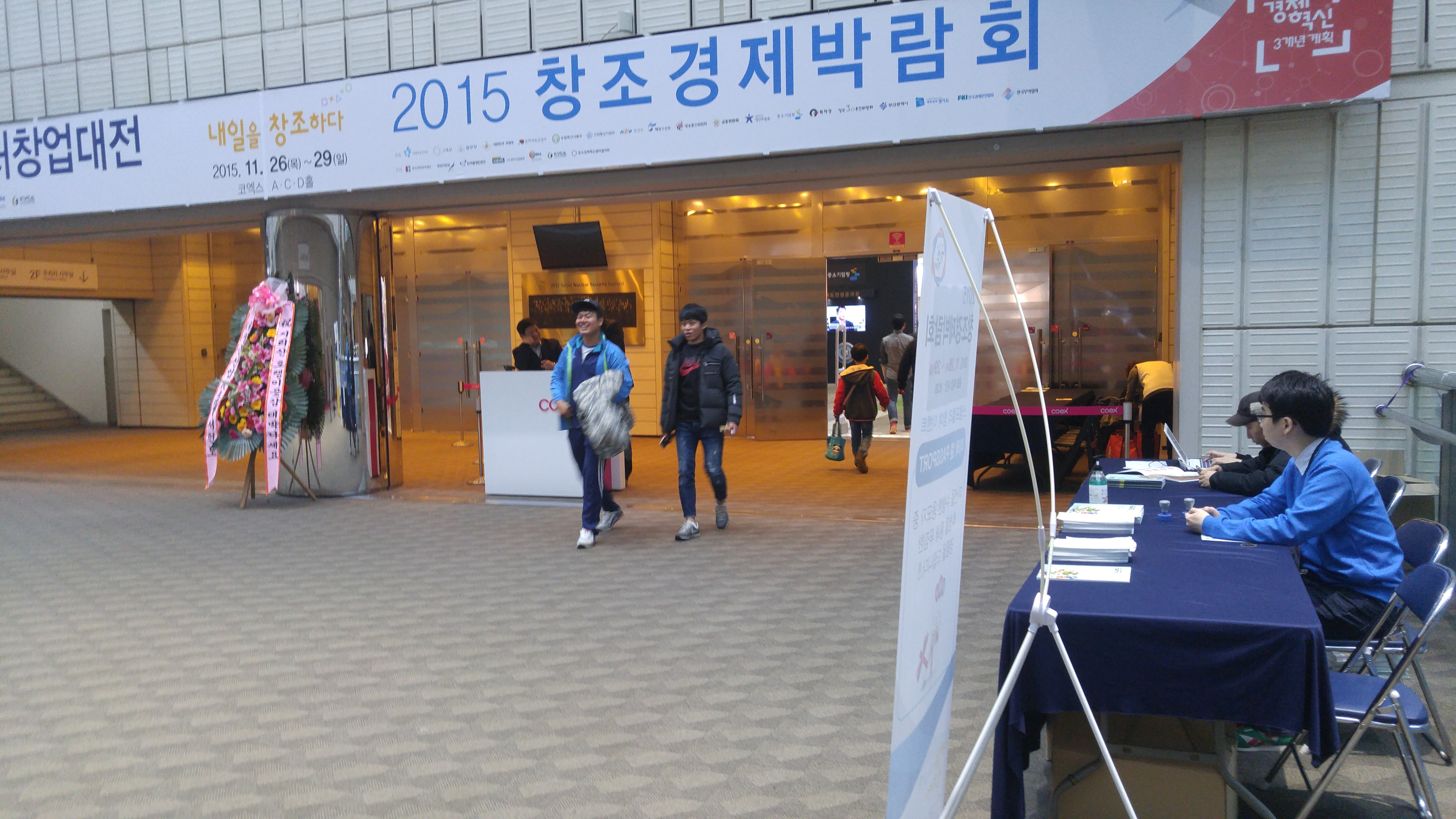 엑스포